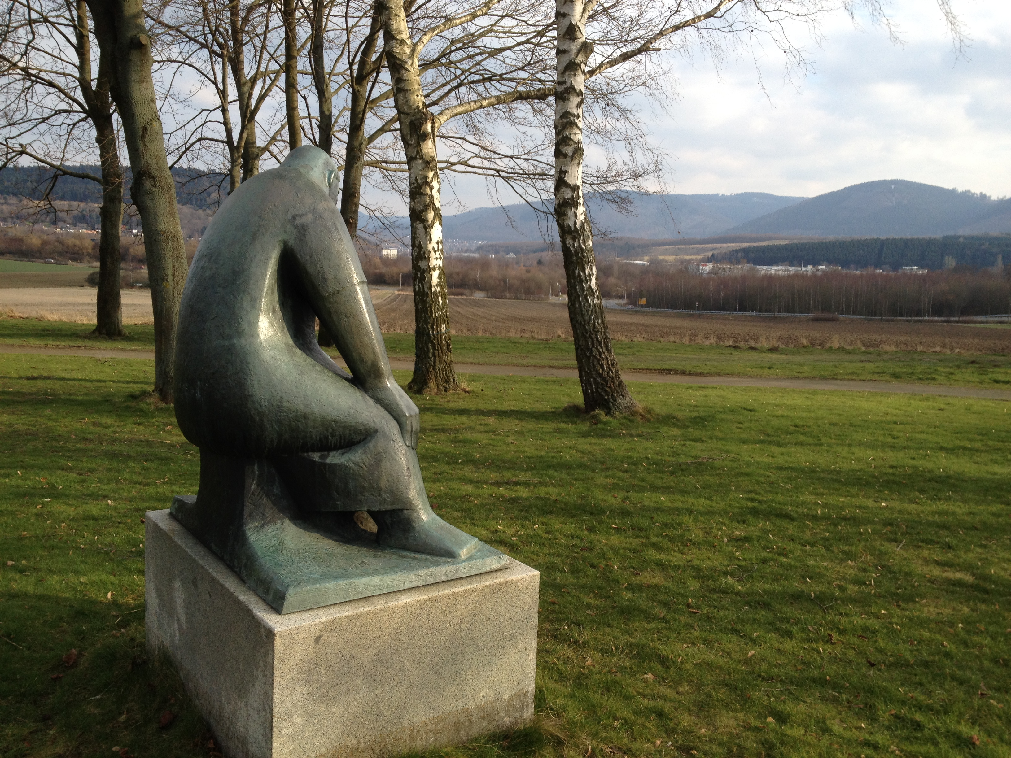 Die erste Bronzeskulptur "Rübezahl" schuf Erich Elsner 1955 (Höhe 48,5 cm; [1]). 1982 fertigte er für die Stadt Goslar eine überlebensgroße Version an. Sie steht am Südostrand des Stadtteils Jürgenohl (Robert-Koch-Straße) mit Blick auf den Harz. Die Bildidee ist allerdings, dass Rübezahl auf dem höchsten Berggipfel (des Riesengebirges) sitzt und von dort auf die Menschenwelt hinabschaut ([2]).